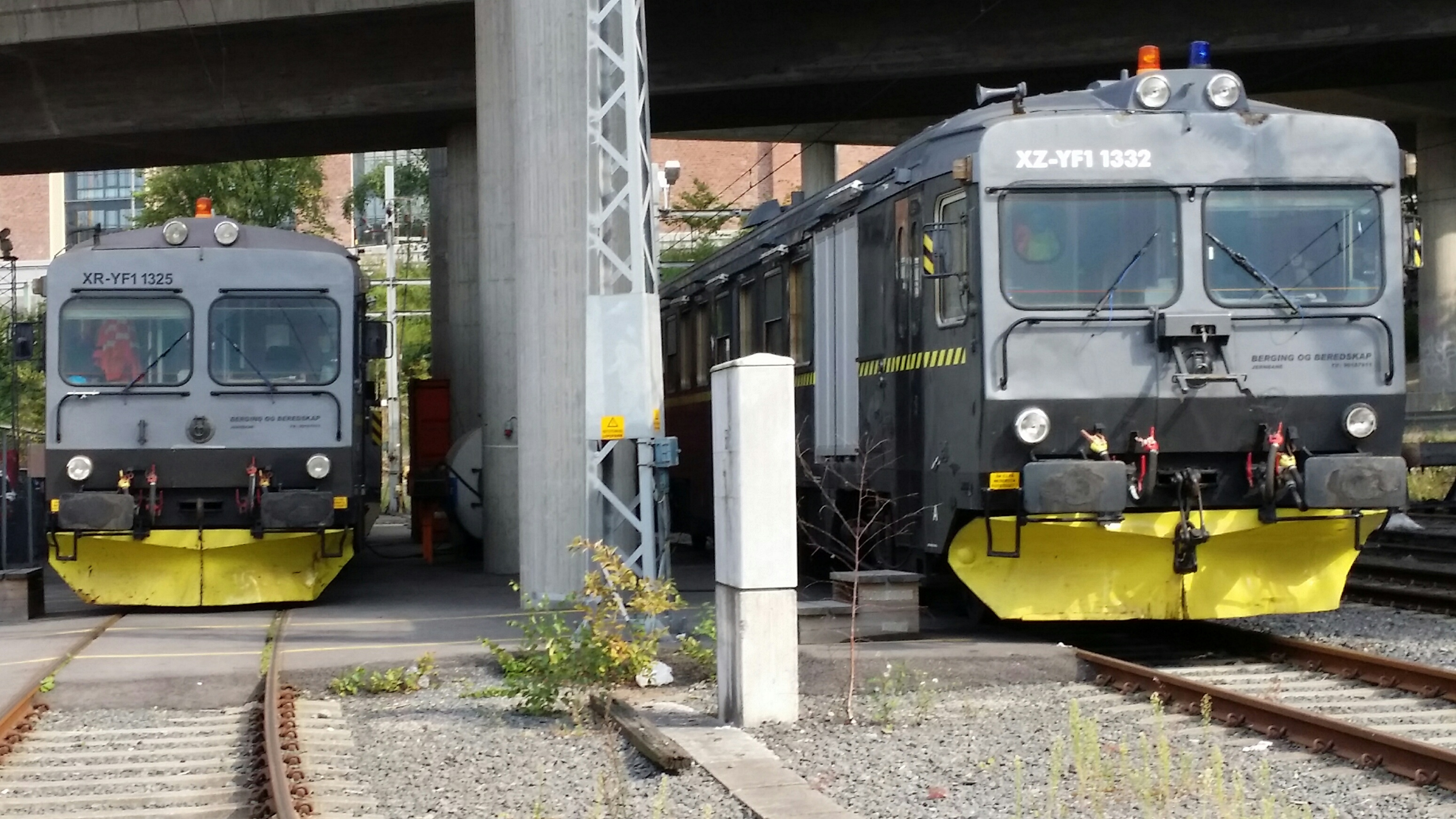 Bergings to Y1 i Lodalen.